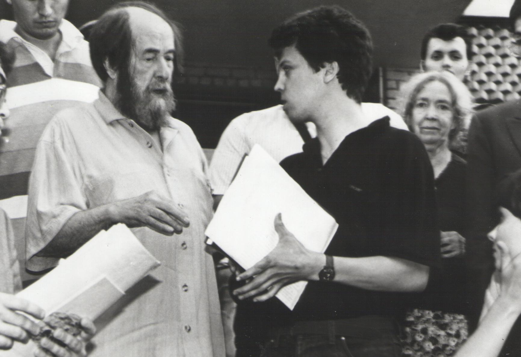 Александр Солженицын и Михаил Матвеев. 8 сентября 1995 г., Самара.